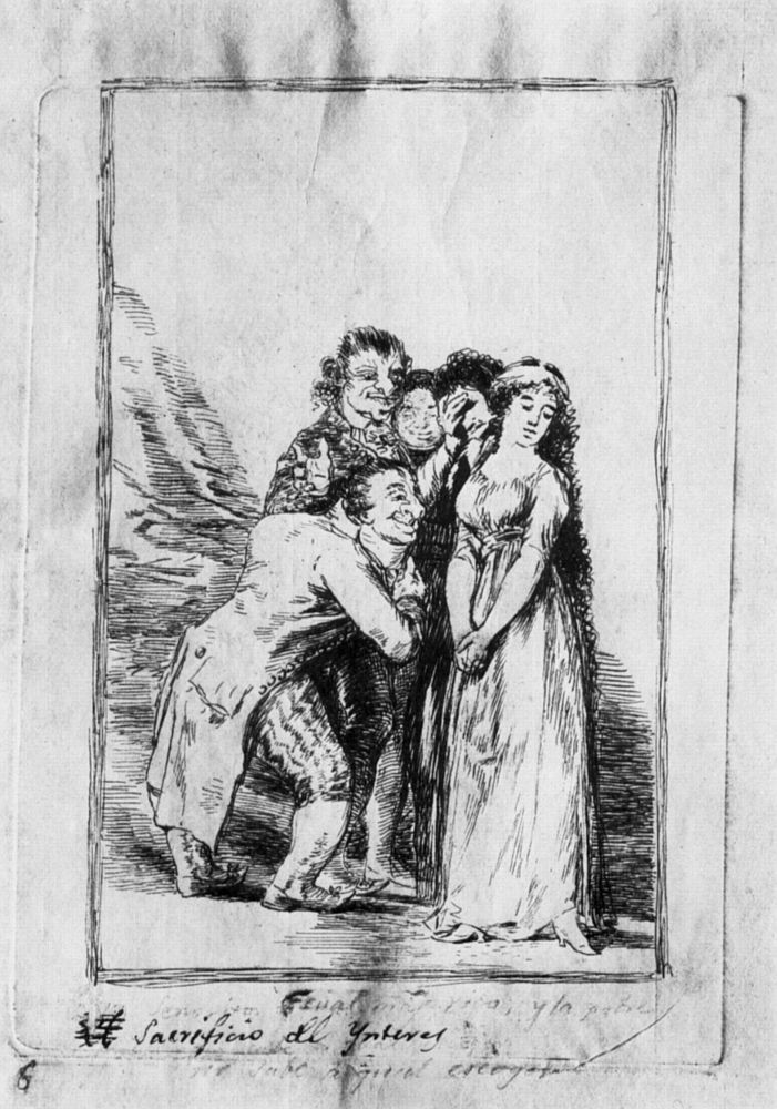 Dibujo preparatorio del capricho nª 14.